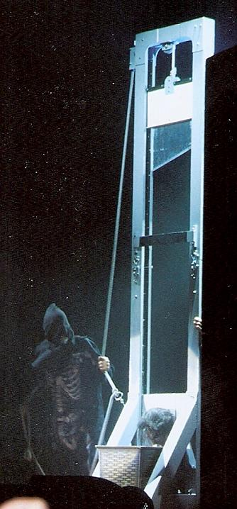 Emiliàn e rumagnòl: Alice Cooper prònt a pèrdar la sò tèsta in sima al palc a Milàṅ in dal Nuvémbar dal 2010